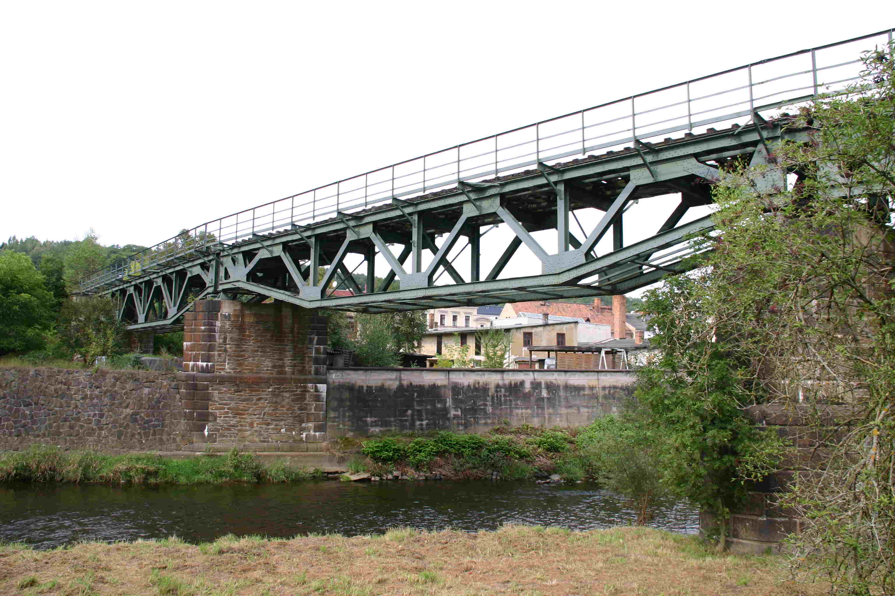 Bahnbrücke Greiz über die Weiße Elster